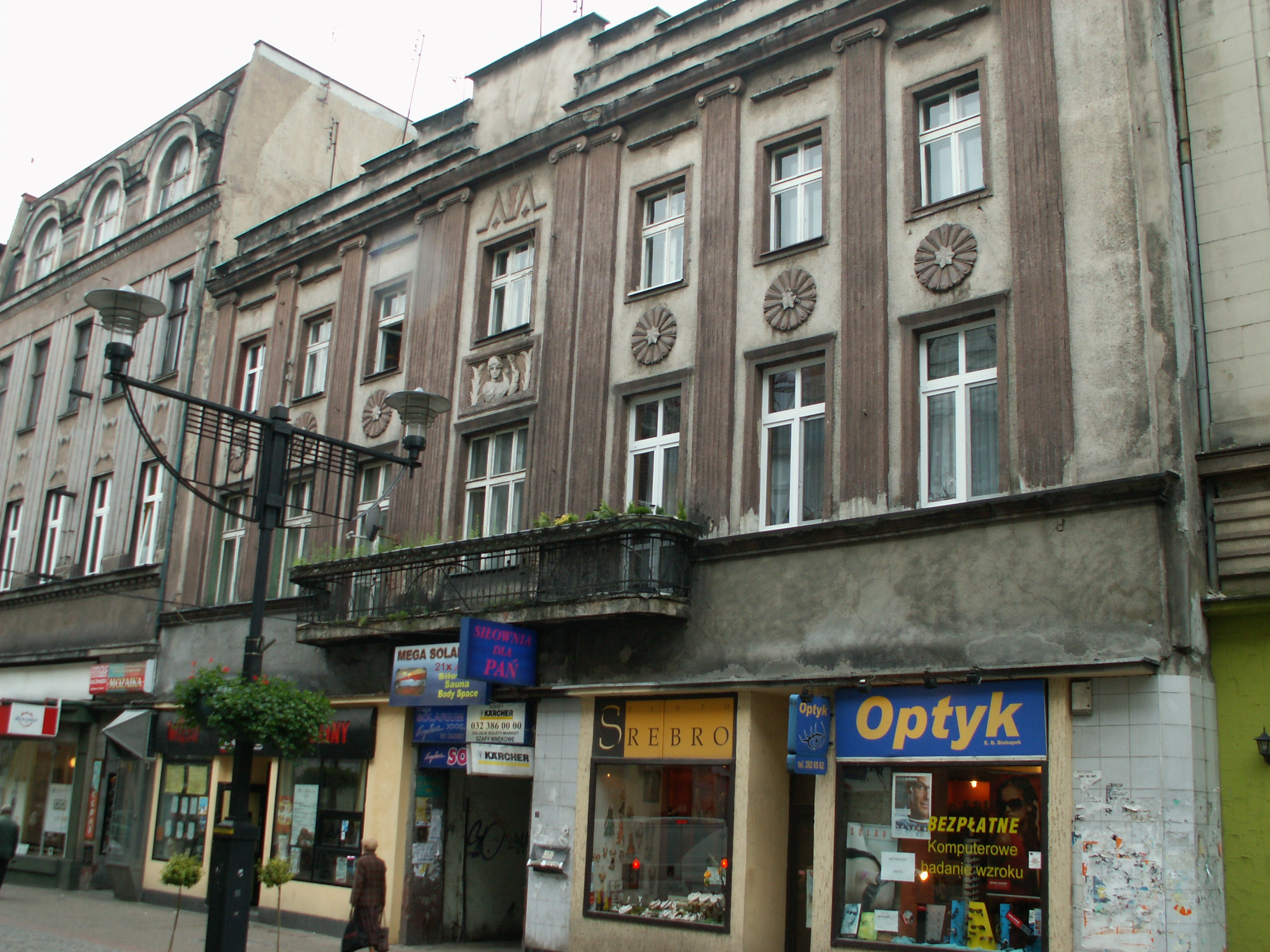 Dawny budynek Musikhaus Cieplik w Bytomiu